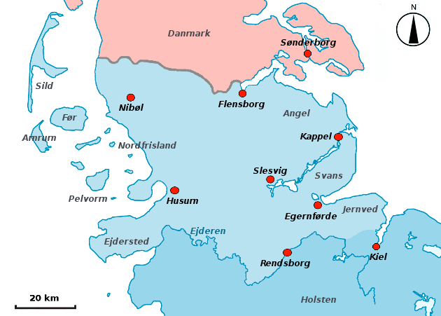 Kort over Sydslesvig